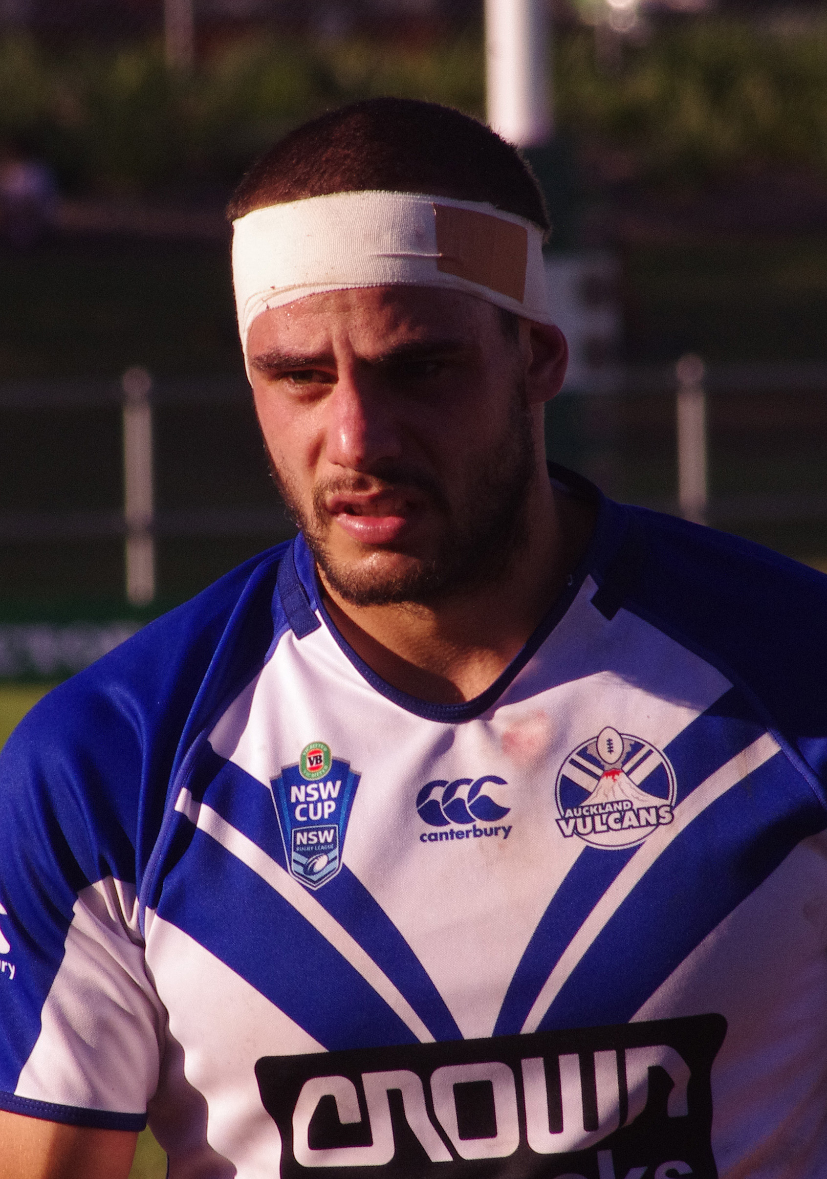 STEVE RAPIRA